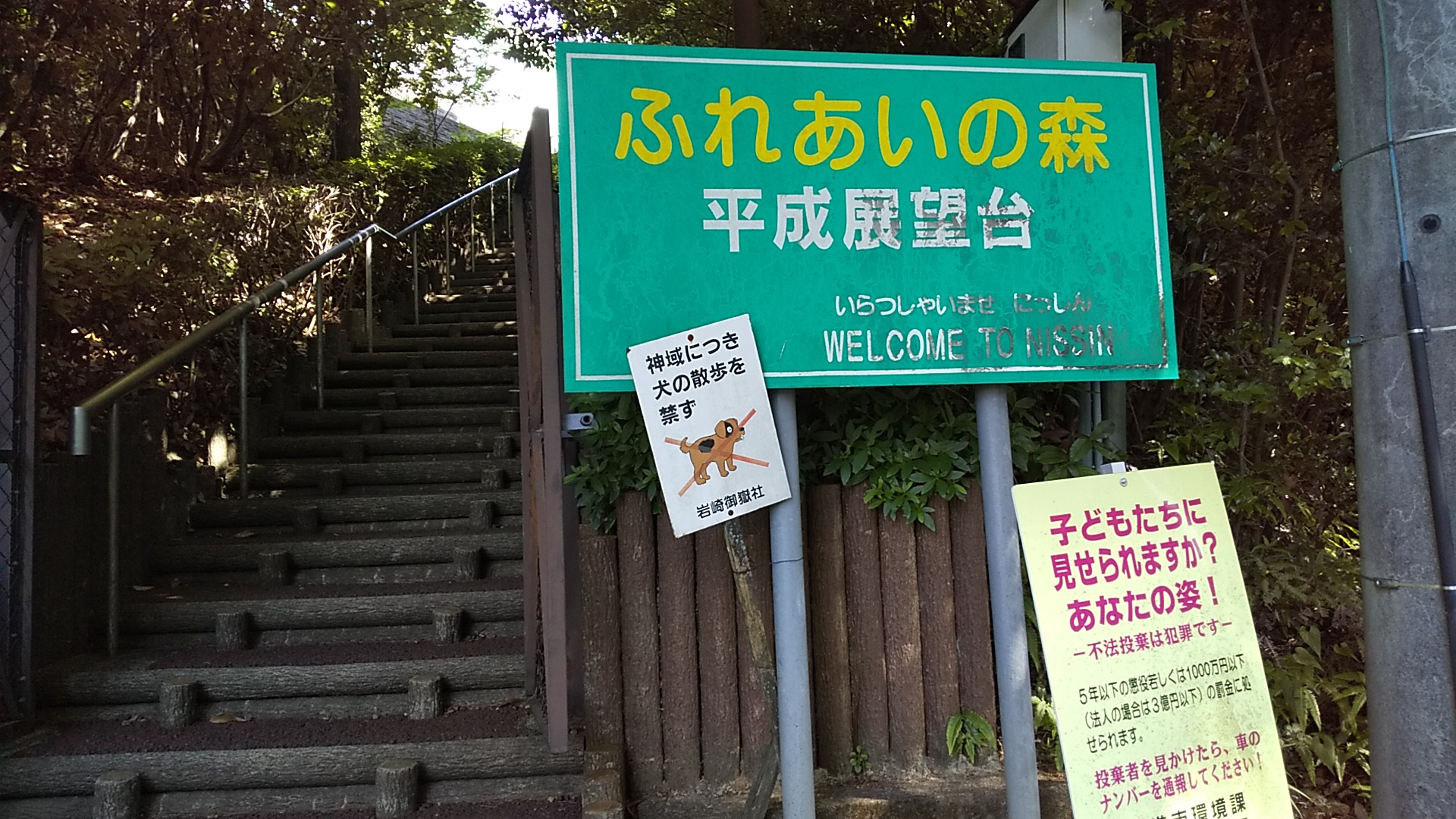 御岳神社（日進市）の境内にある看板のうちの一つ。